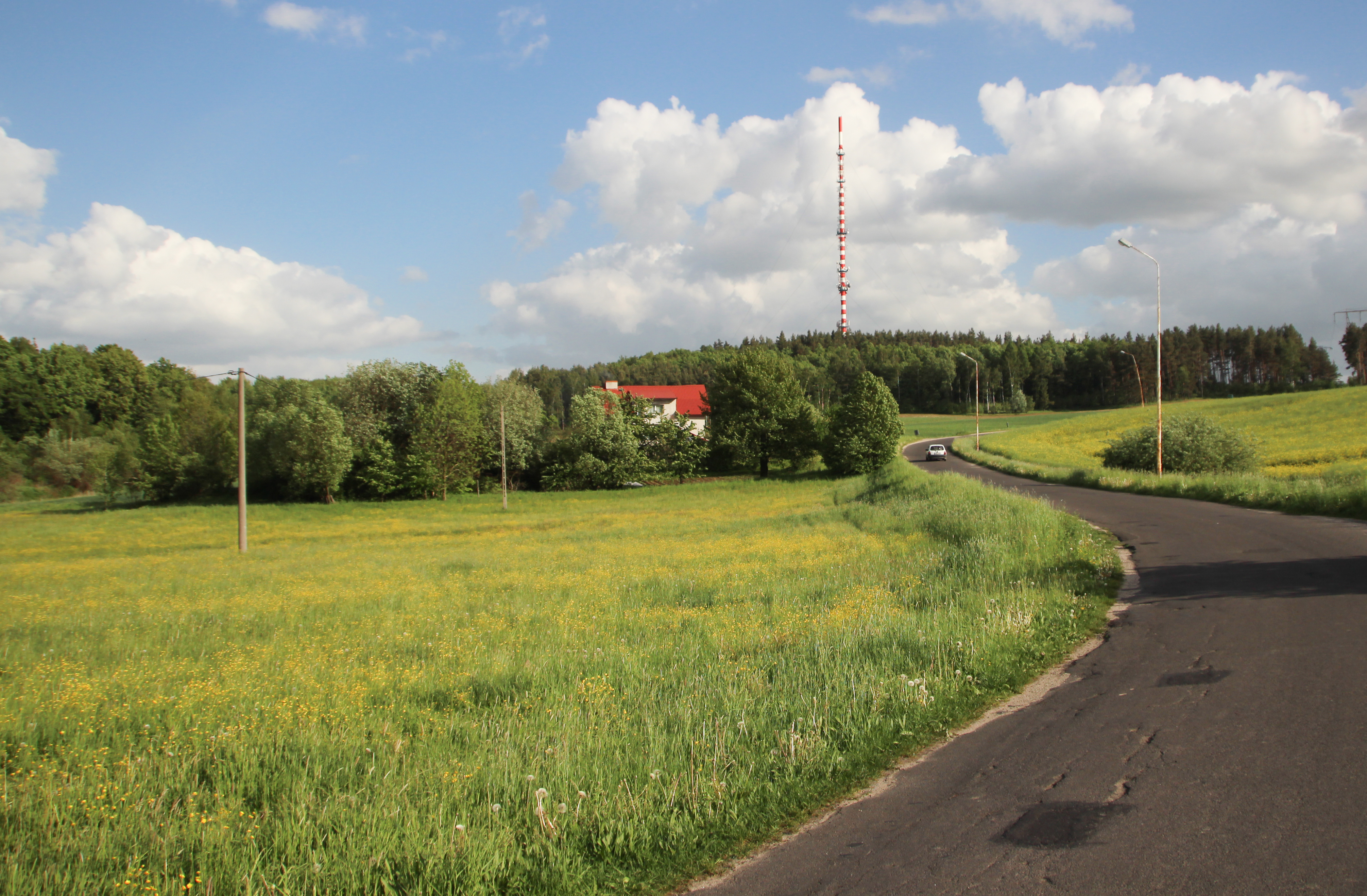 Wyręba – wieś w Polsce, w województwie dolnośląskim, w powiecie lubańskim, w gminie Siekierczyn. '